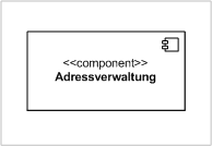 Component diagram